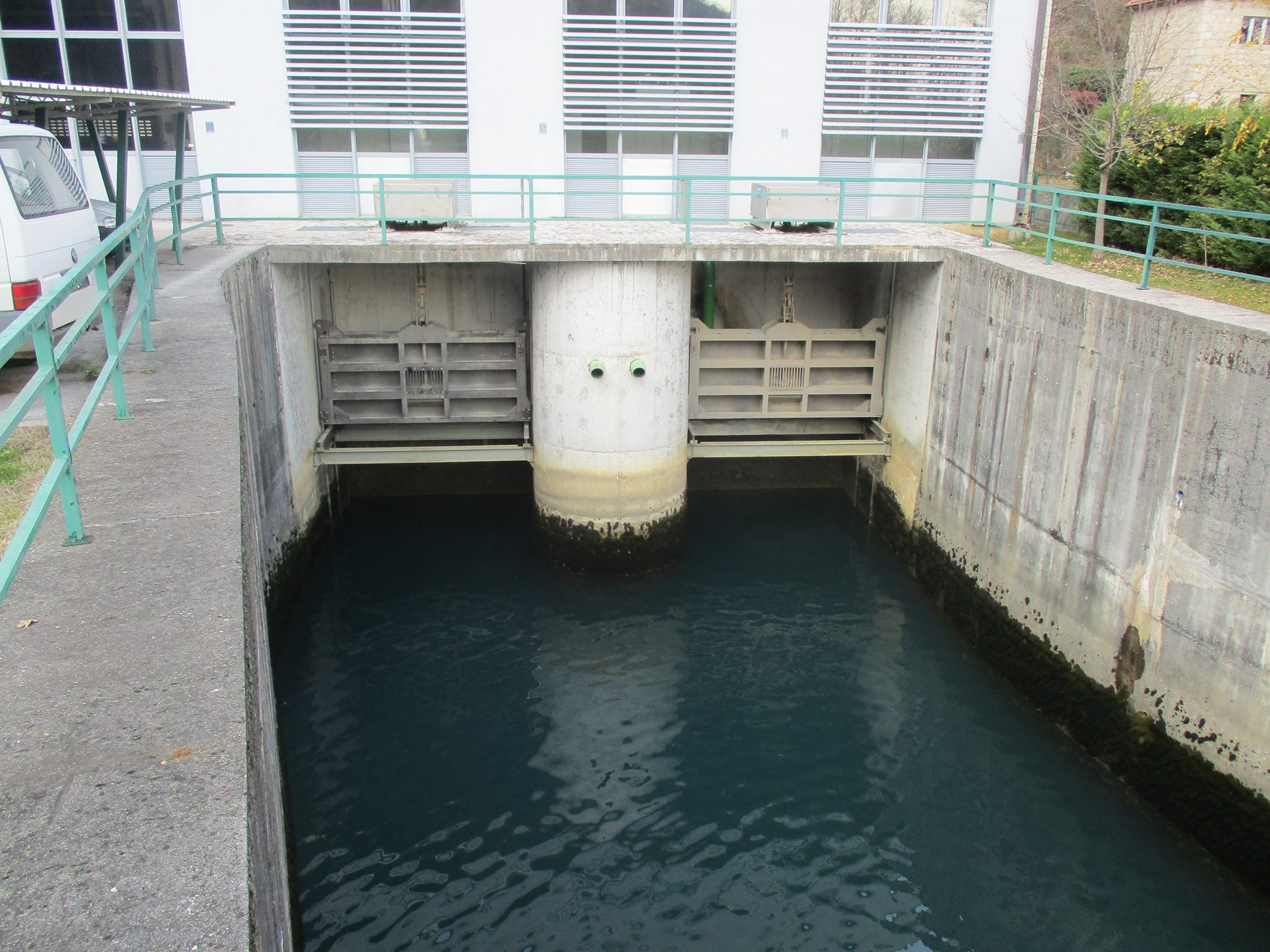 Difuzorski tablasti zatvarači